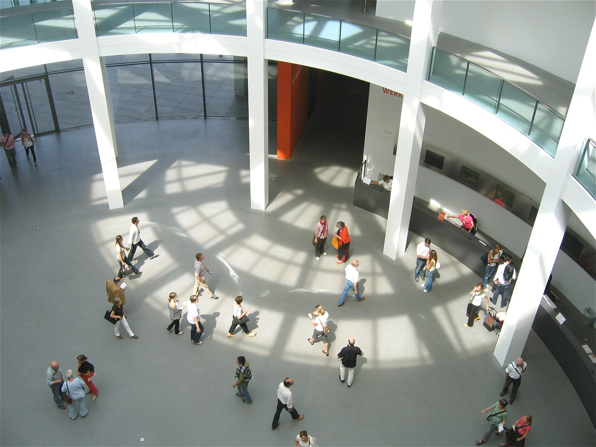 Pinakothek der Modernein München, Rotunde